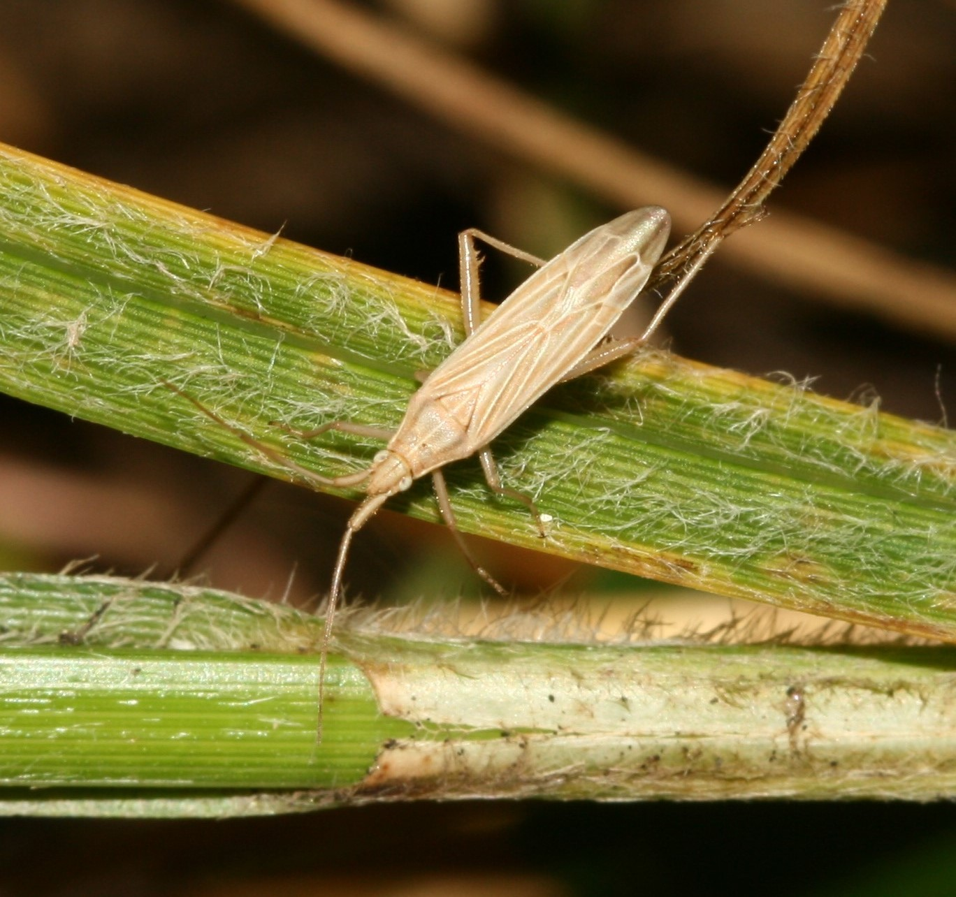 In pondside vegetation